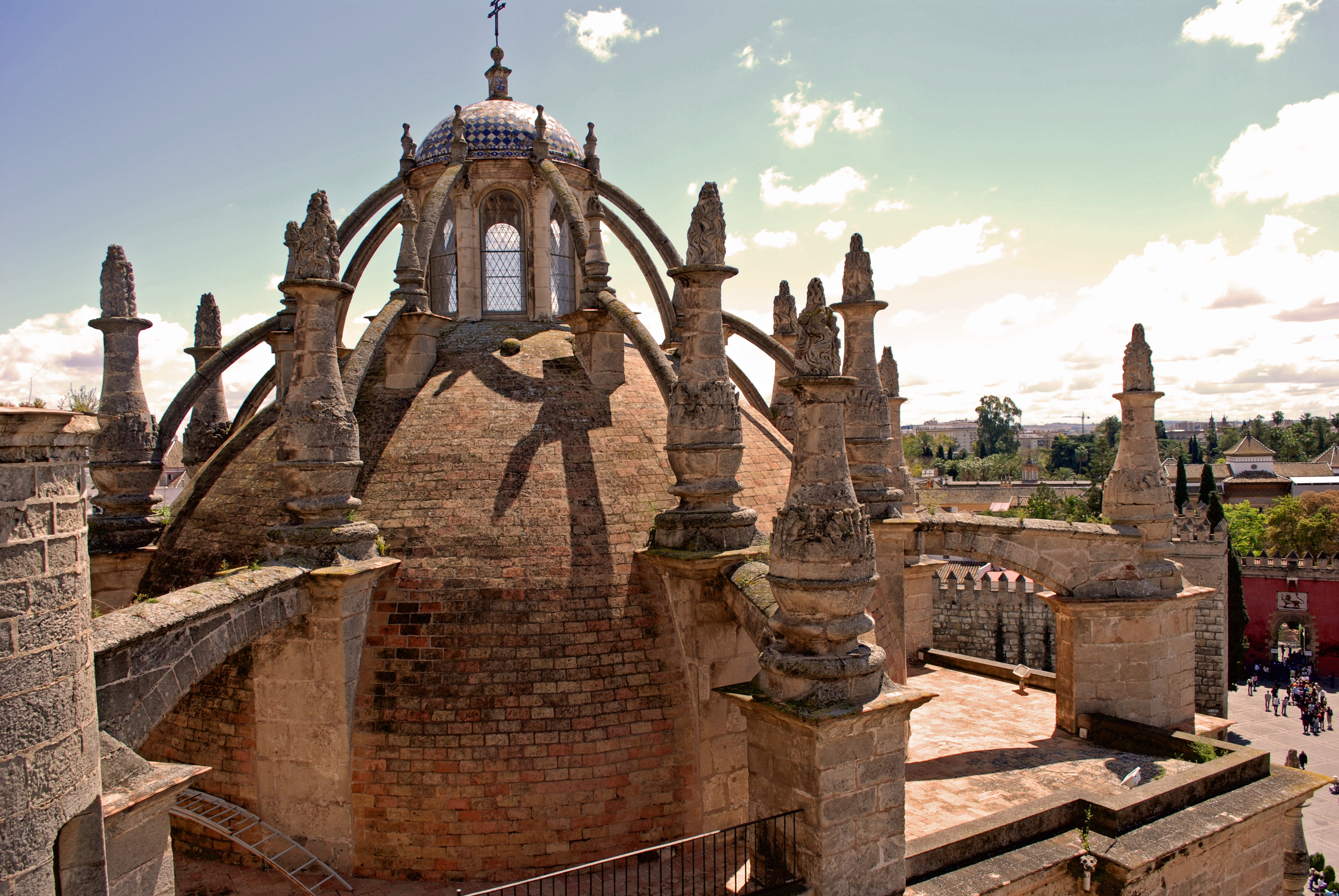 Vista exterior de la cúpula de la sacristía mayor de la Catedral de Sevilla